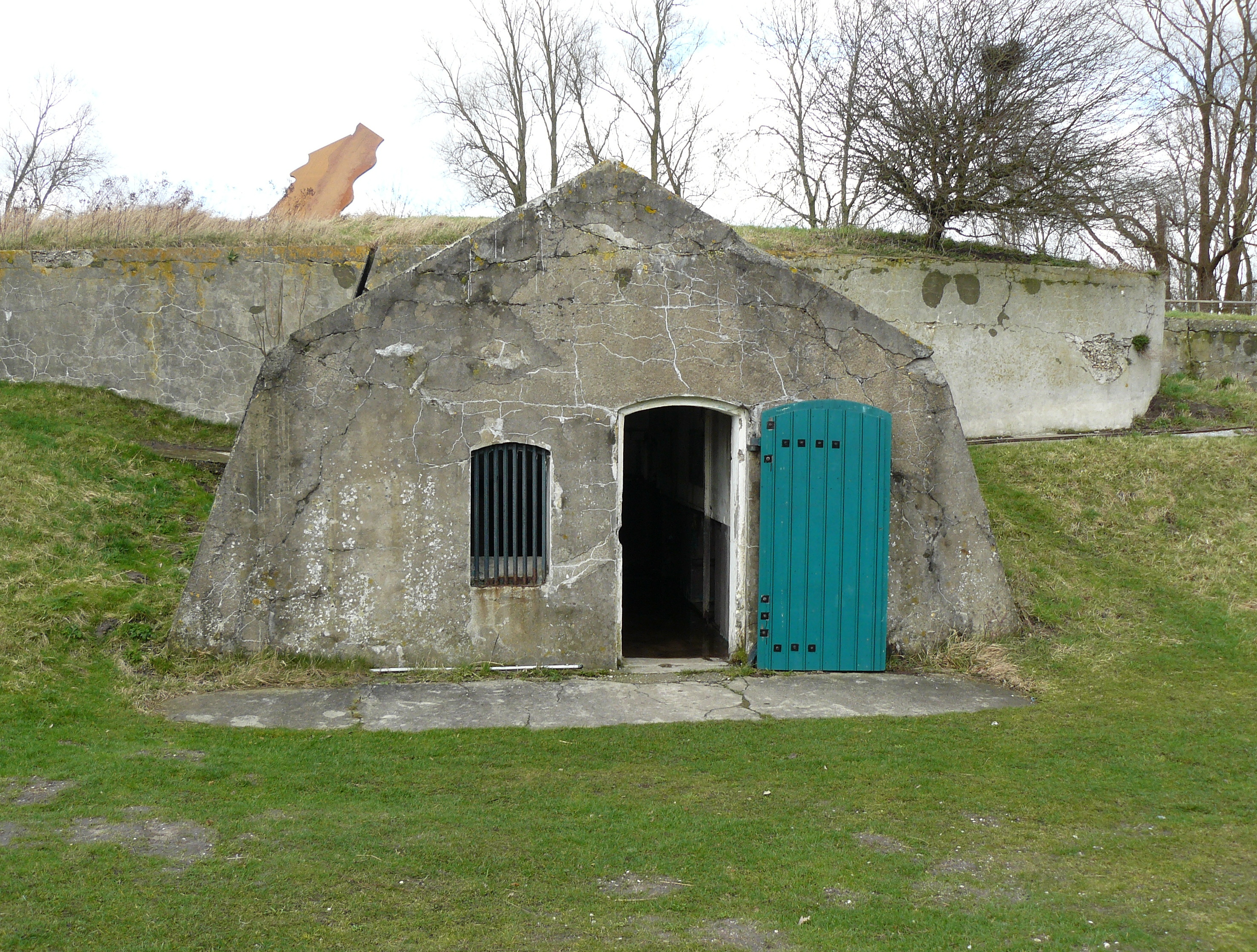 Een van de drie munitiemagazijnen bij de opstelplaatsen voor de grote kanonnen.